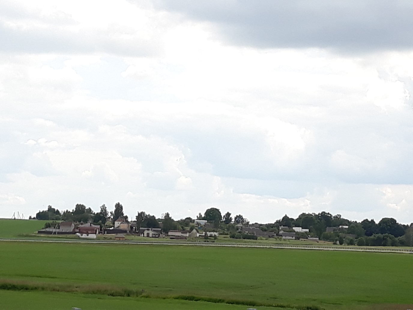 вёска ўлетку 2018